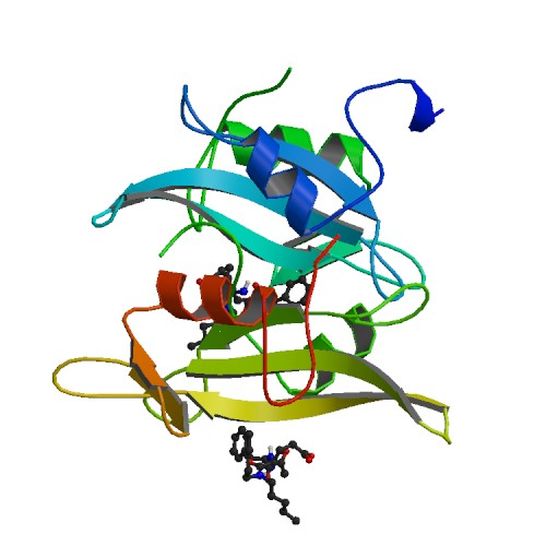 Src kinase structure